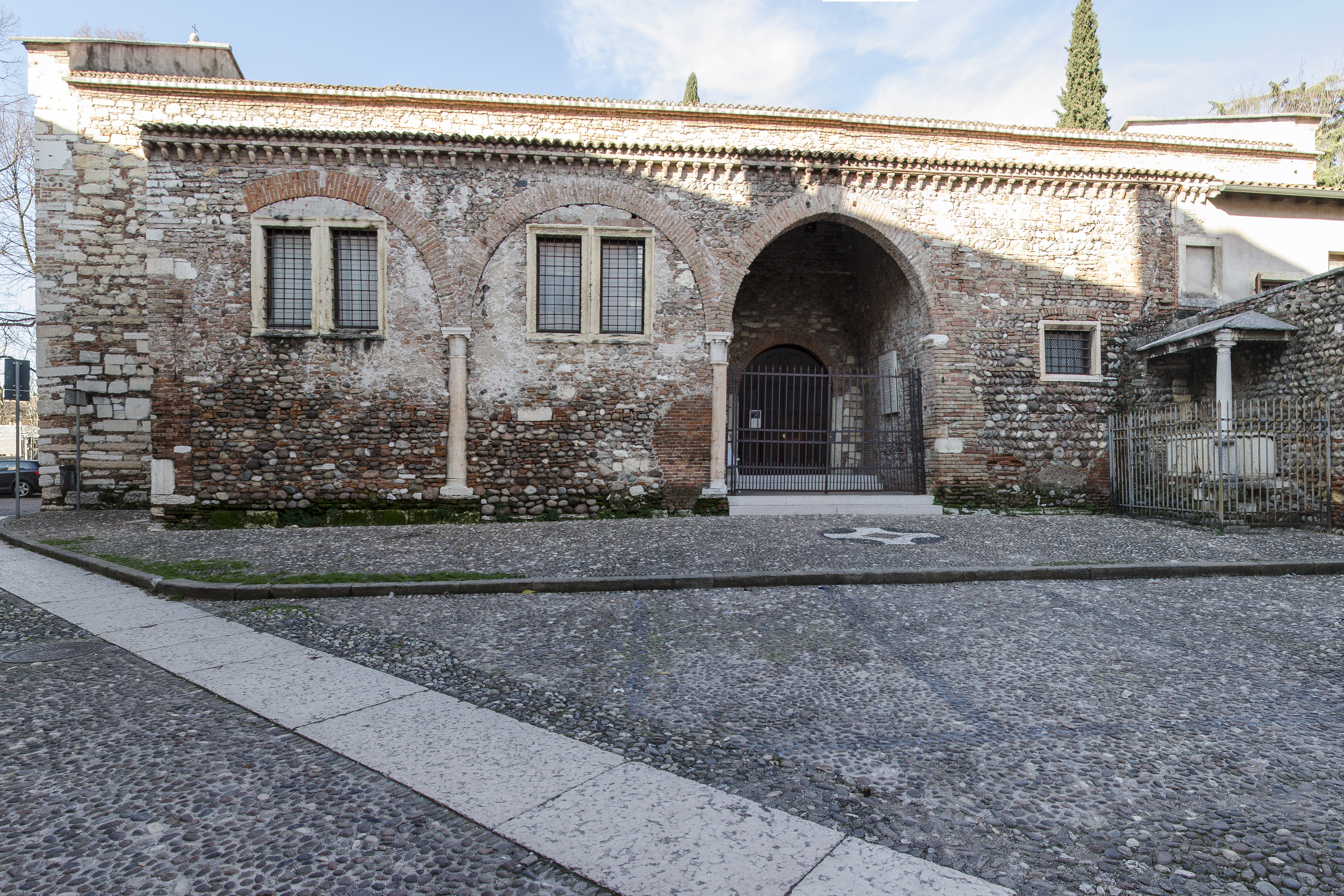 Prospetto laterale